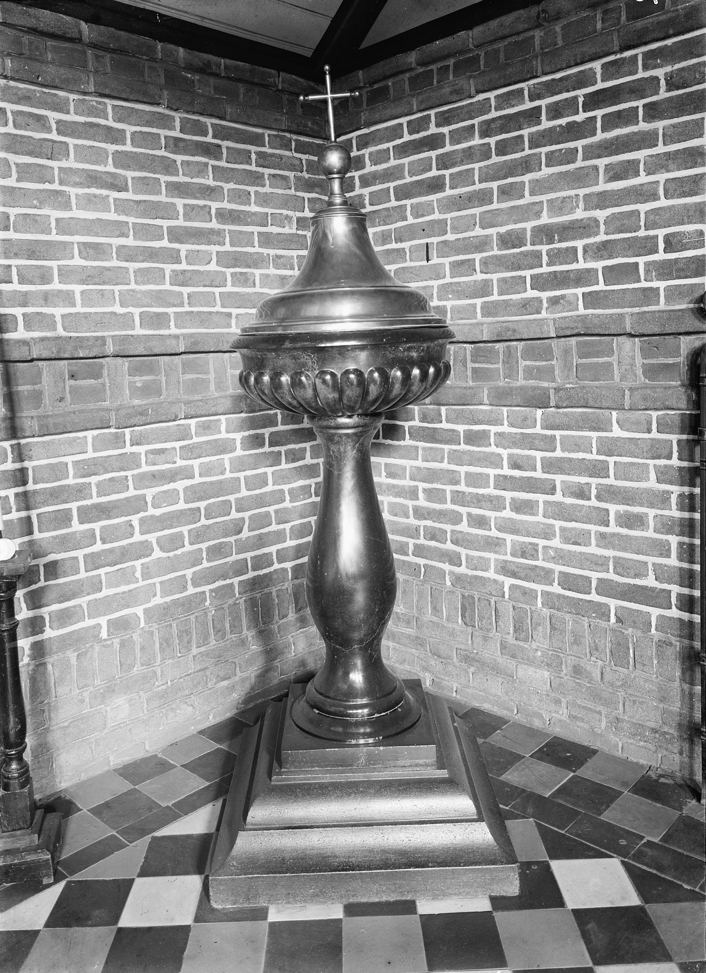 Rooms-Katholieke Kerk: Interieur, doopvont